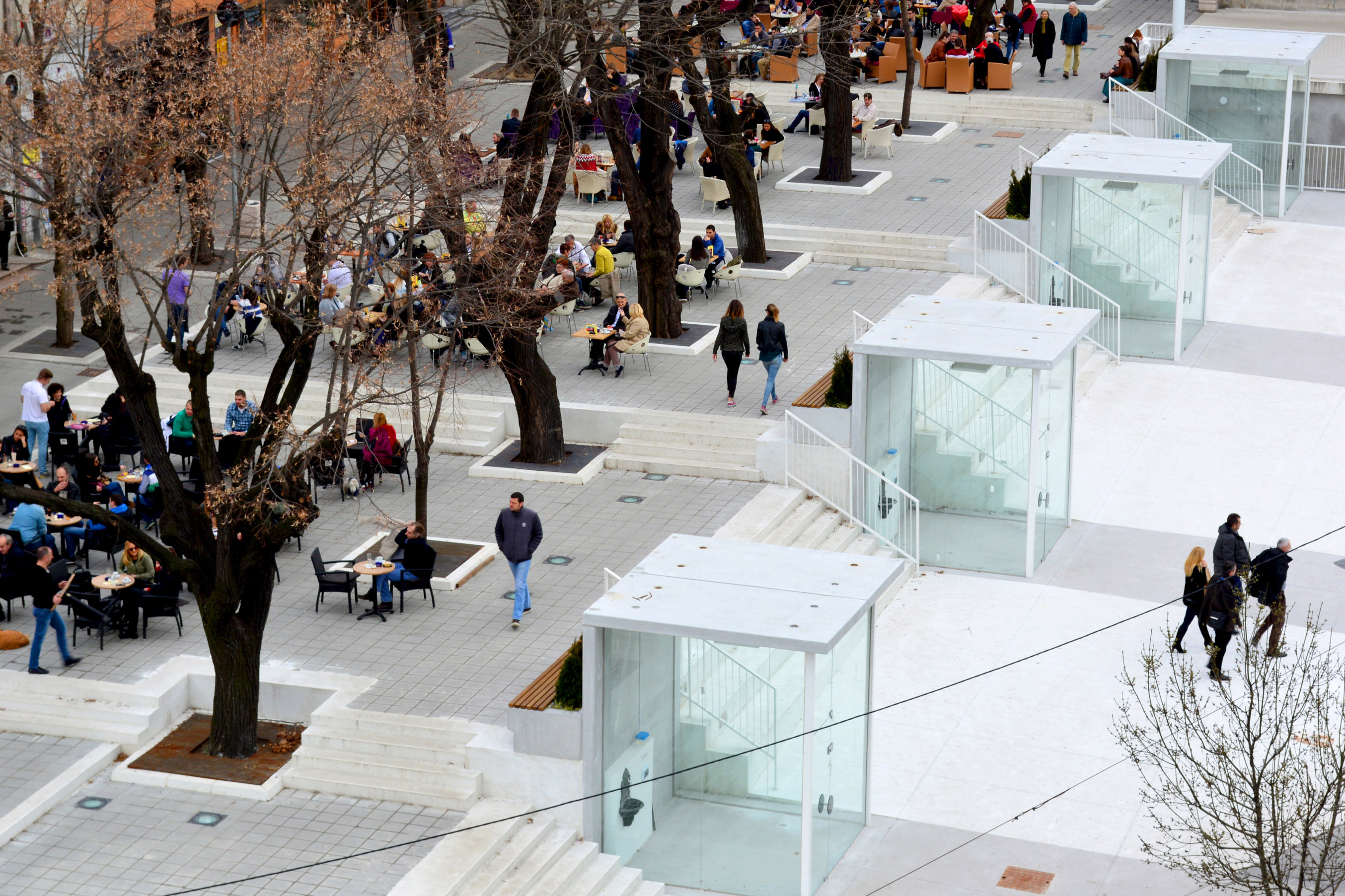 cvetni trg snimak sa JDPa